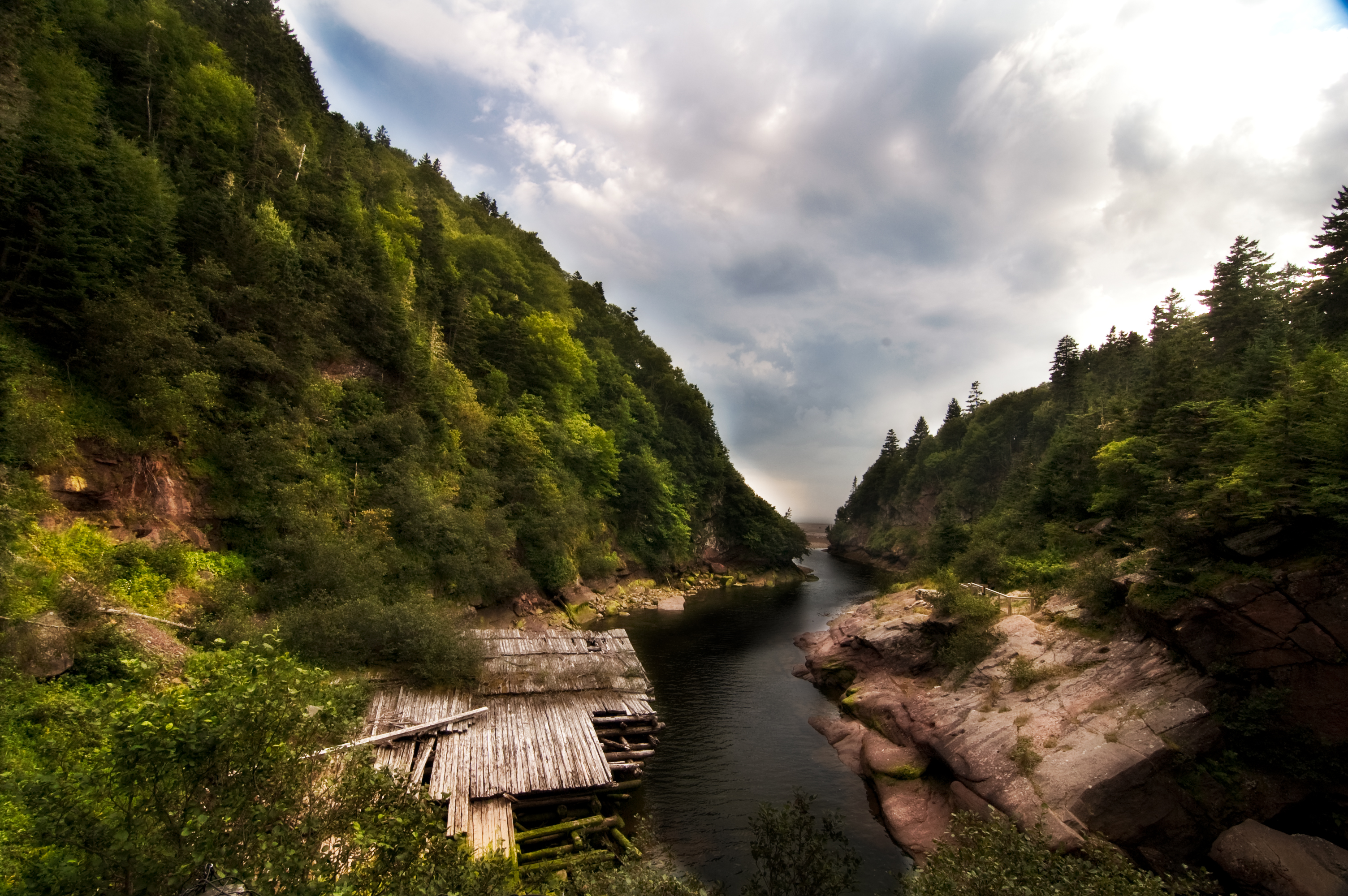 Ruine du barrage et rivière Point Wolfe dans le parc national de Fundy